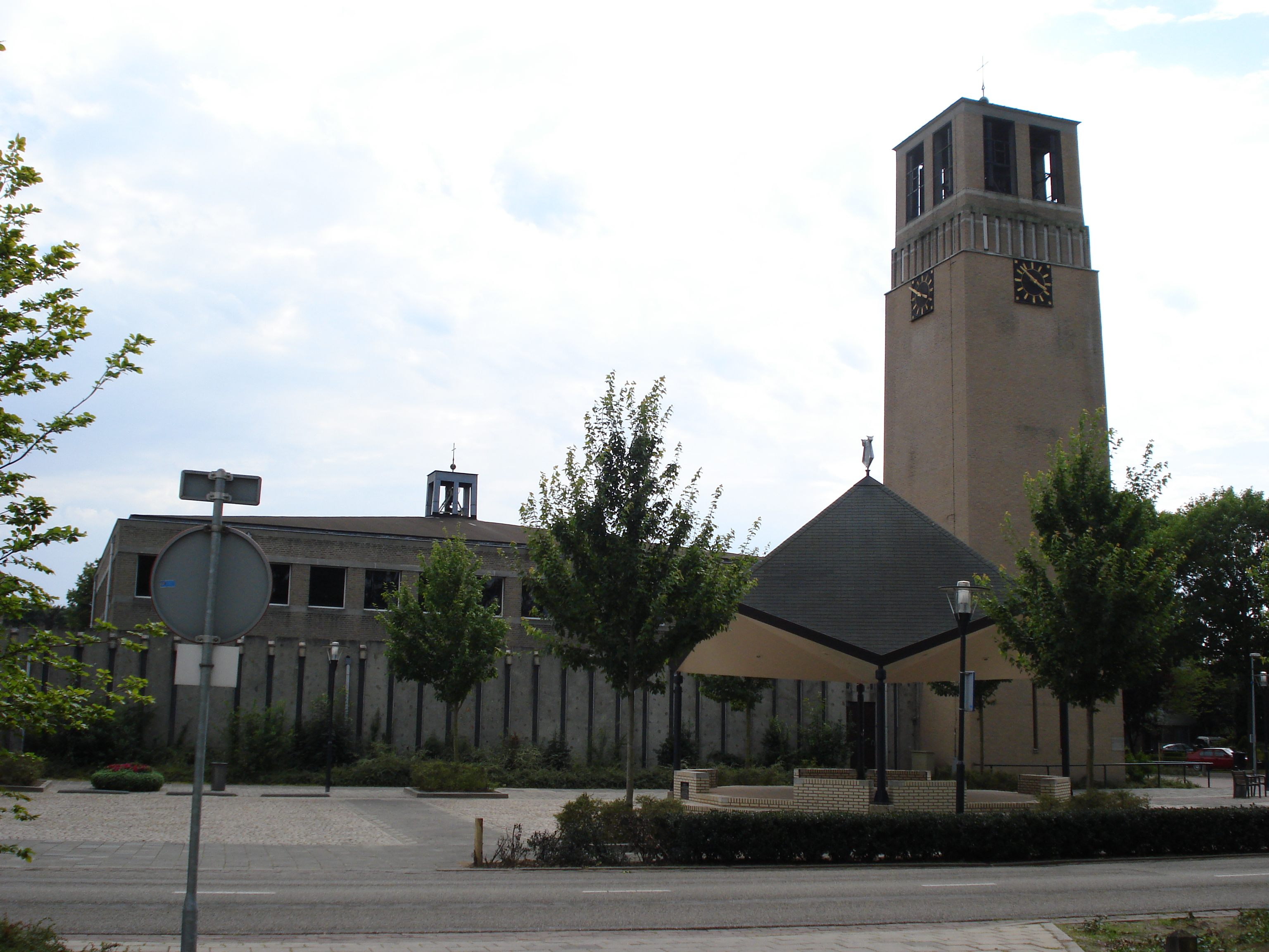 Odiliapeel, commune d'Uden, l'église de la découverte de la Croix, 1959, Jan de Jong (architecte)